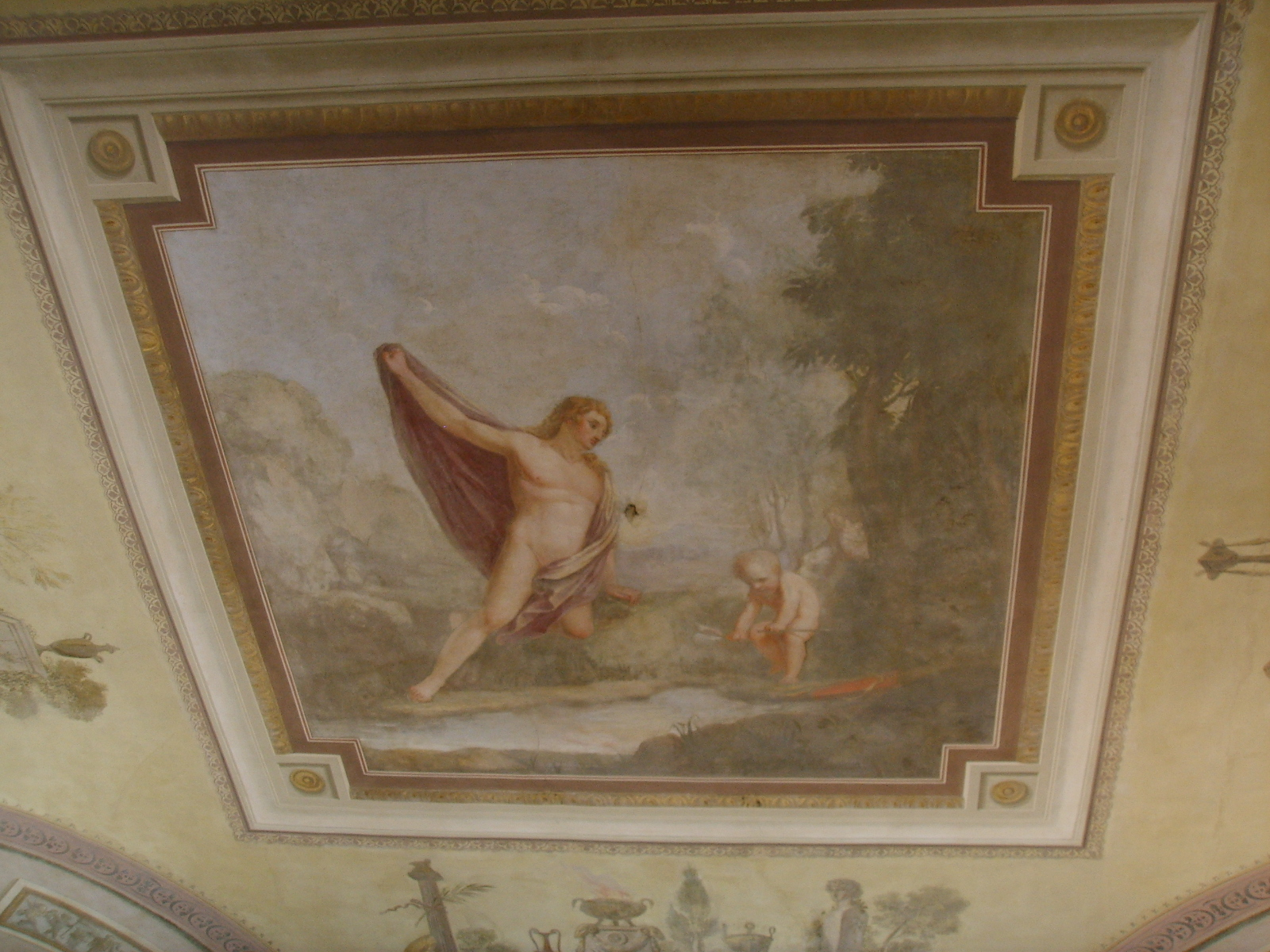 Palazzo incontri, affreschi neoclassici